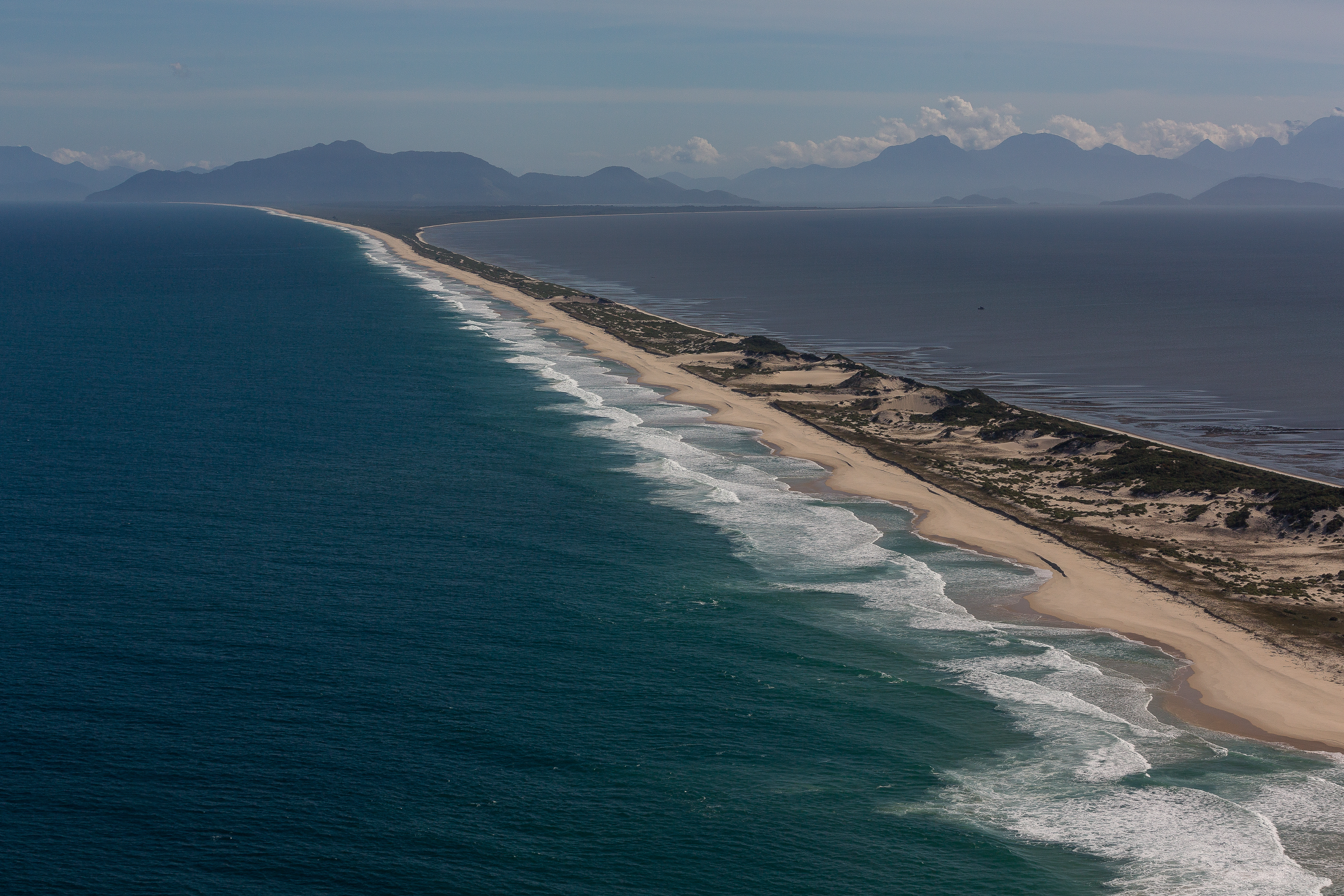 Vista aérea da Restinga da Marambaia, Barra de Guaratiba, Rio de Janeiro - RJ - Brasil.